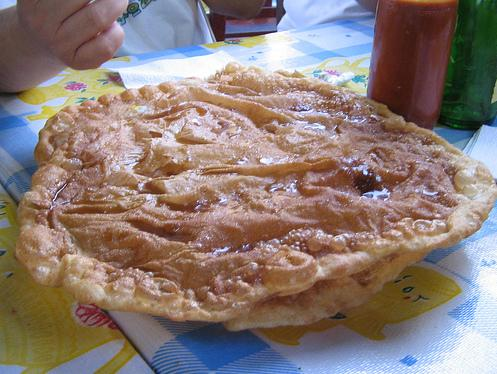 Buñuelos de Uriangato